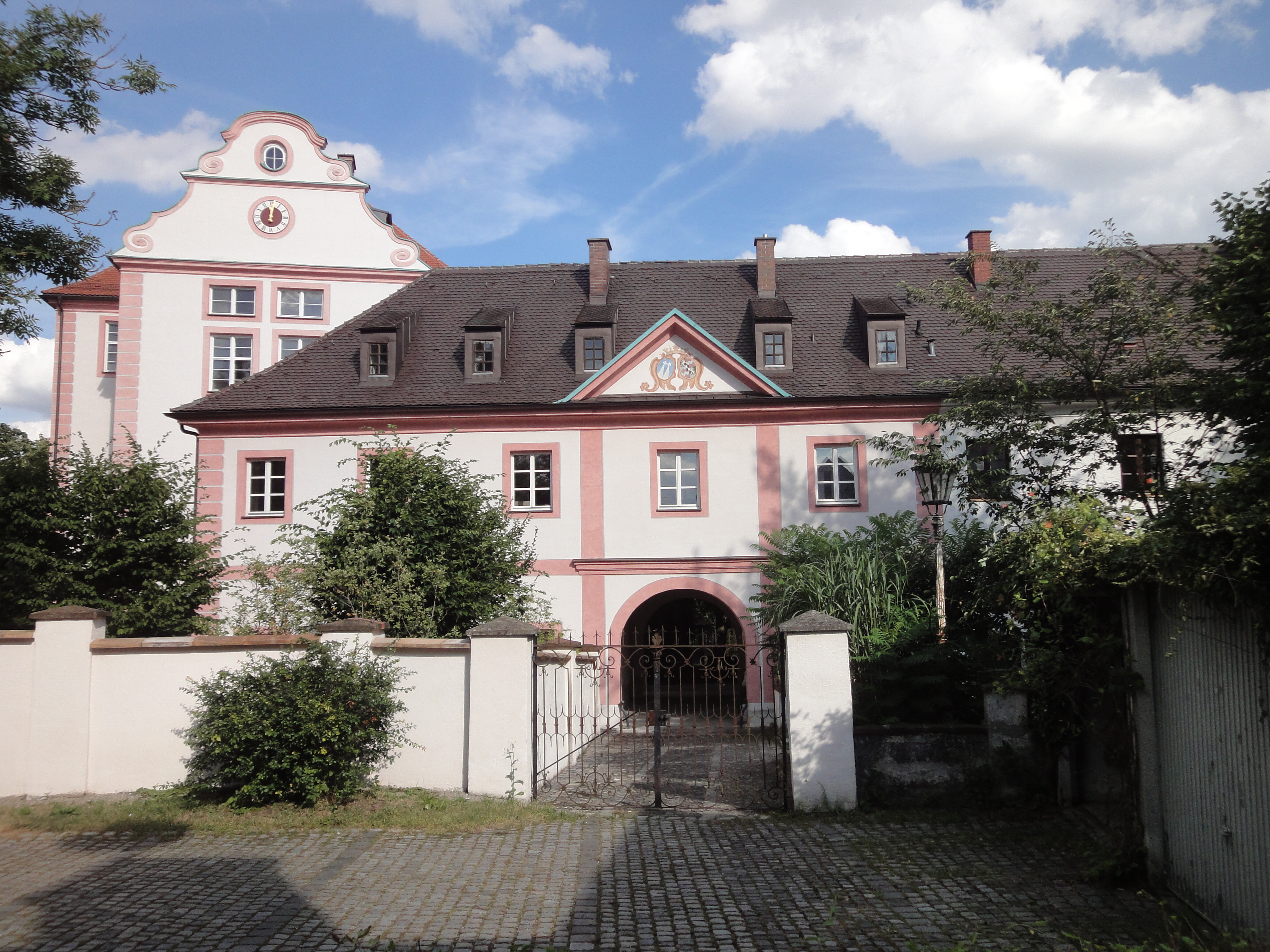 Langschloss in Neusäß-Hainhofen, langgestreckter Walmdachbau, zweieinhalbgeschossig, um 1760/80. Baudenkmal Bayern D-7-72-184-5